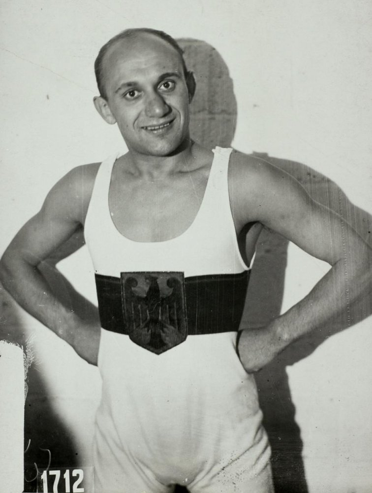 Sport. Sport, Olympische Spelen Amsterdam, 1928 : Olympisch kampioen Grieks/Romeins worstelen tot 58 kg, de Duitser Kurt Leucht.